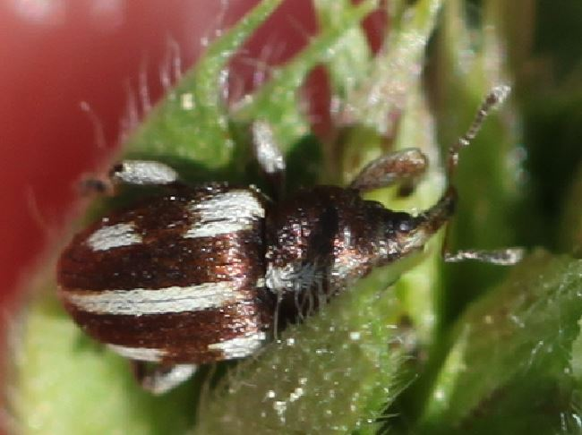 Tychius quinquepunctatus am 27. April 2018 in Walldorf/Baden